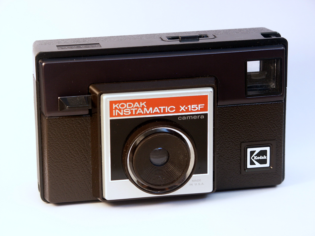 Kodak Instamatic X-15F, c. 1988.